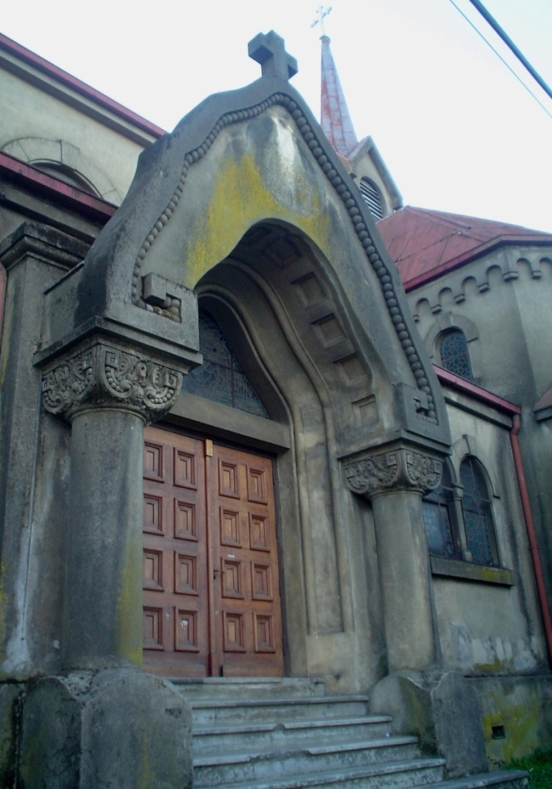 Puerta lateral de la Iglesia San Francisco en calle Vicente Pérez Rosales, Valdivia, Chile